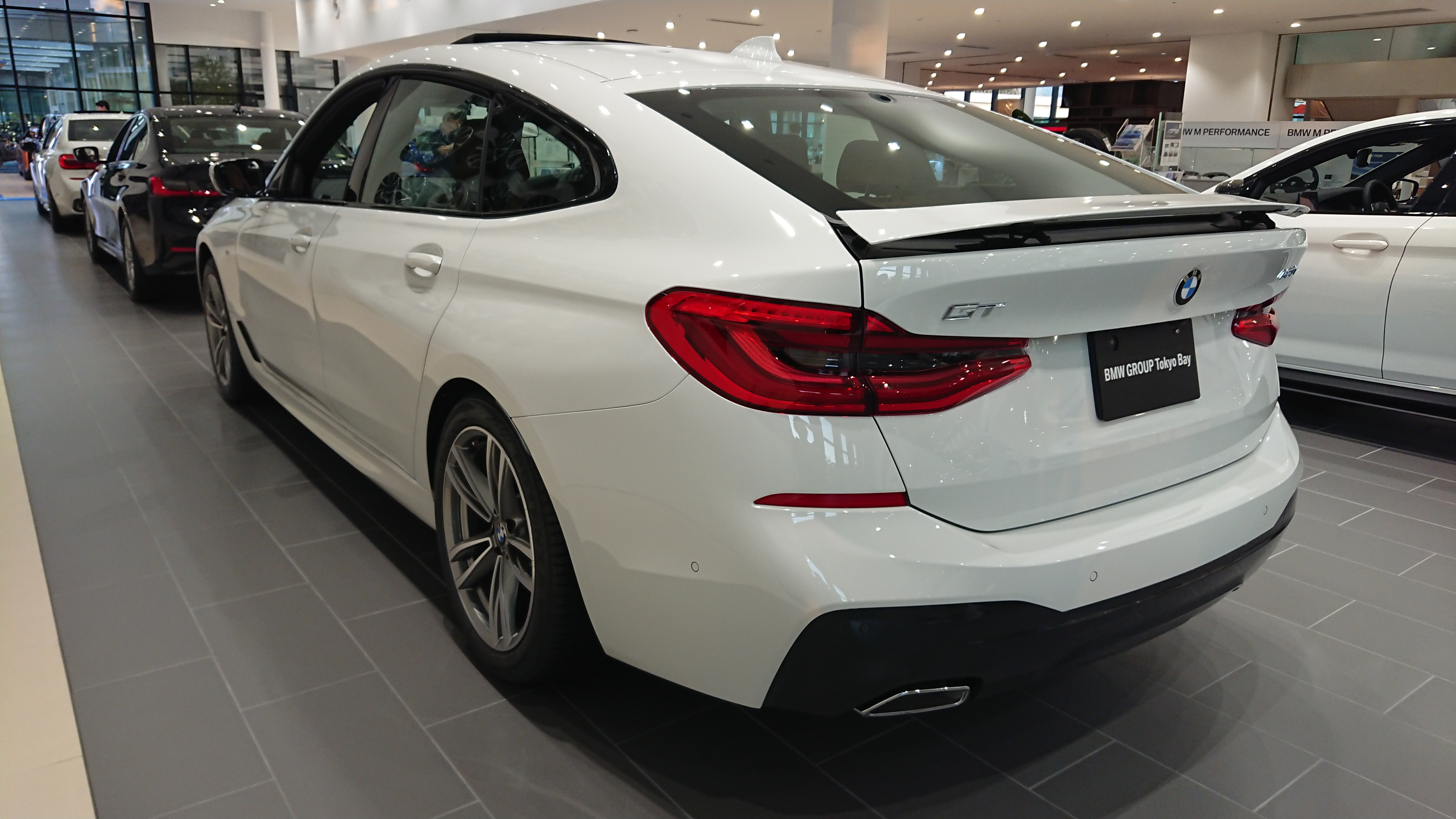 BMW 6シリーズ グランツーリスモ Mスポーツ（リア）